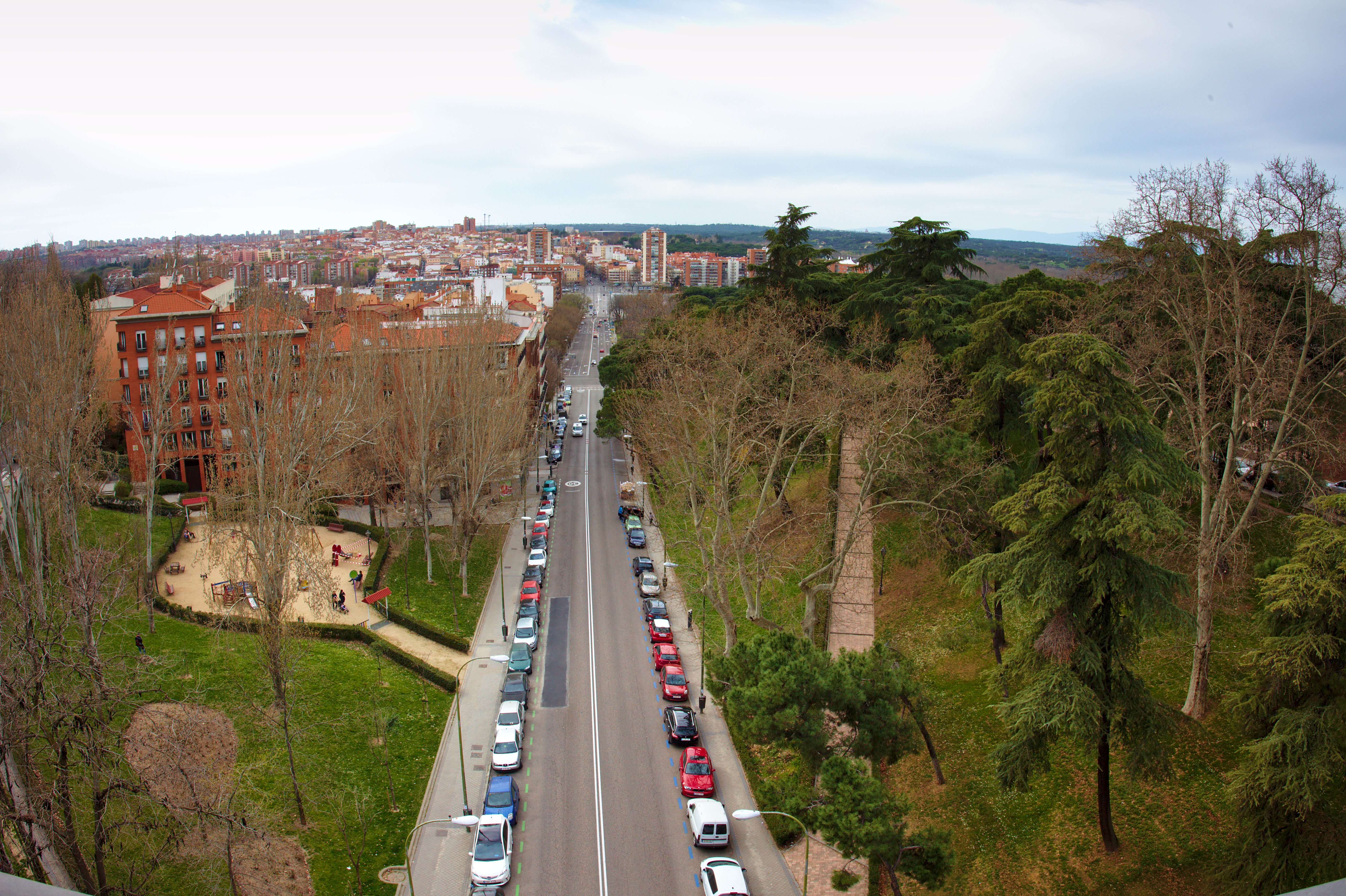 Vista hacia el oeste desde el viaducto 2017